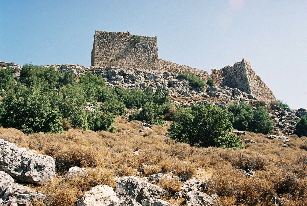 Qala'at Burzey